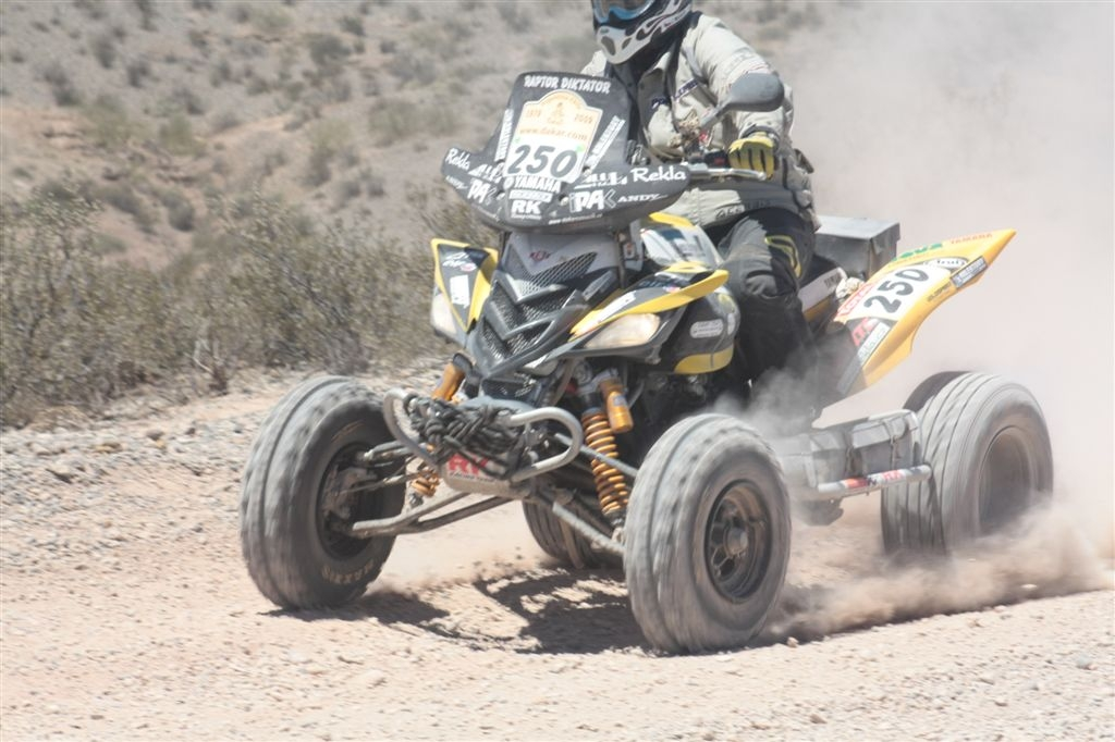 Rally Dakar 2009, etapa 4 Jacobacci Neuquén. El ganador del Rally 2009 en quads, MACHACEK (CZE) Chequia - YAMAHA